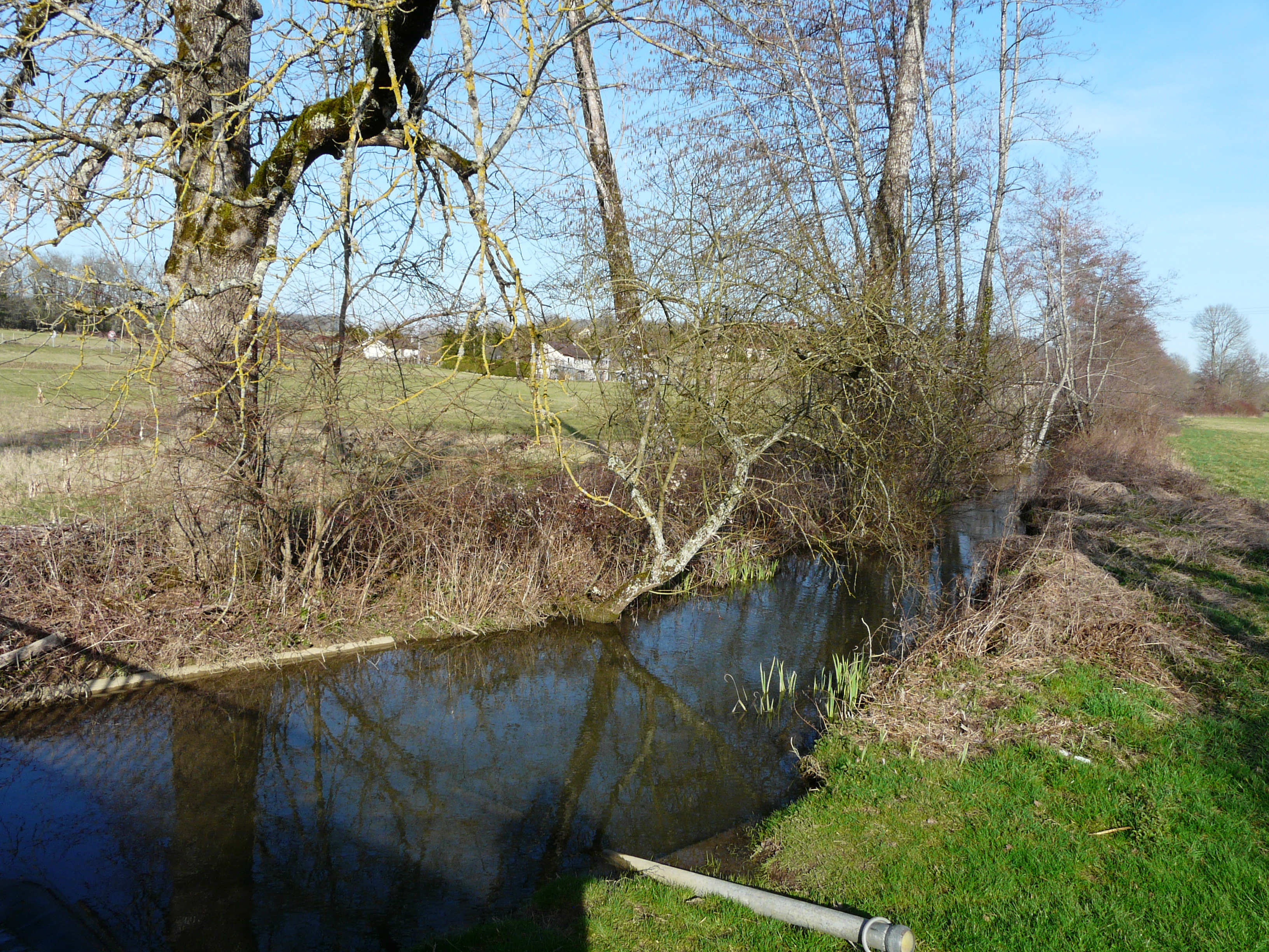 La Soue au nord du bourg de Gabillou, Dordogne, France. Vue prise en direction de l'amont.